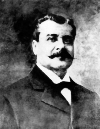 Benjamín Boza (1843-1921), abogado y político peruano. Alcalde de Lima en 1900.